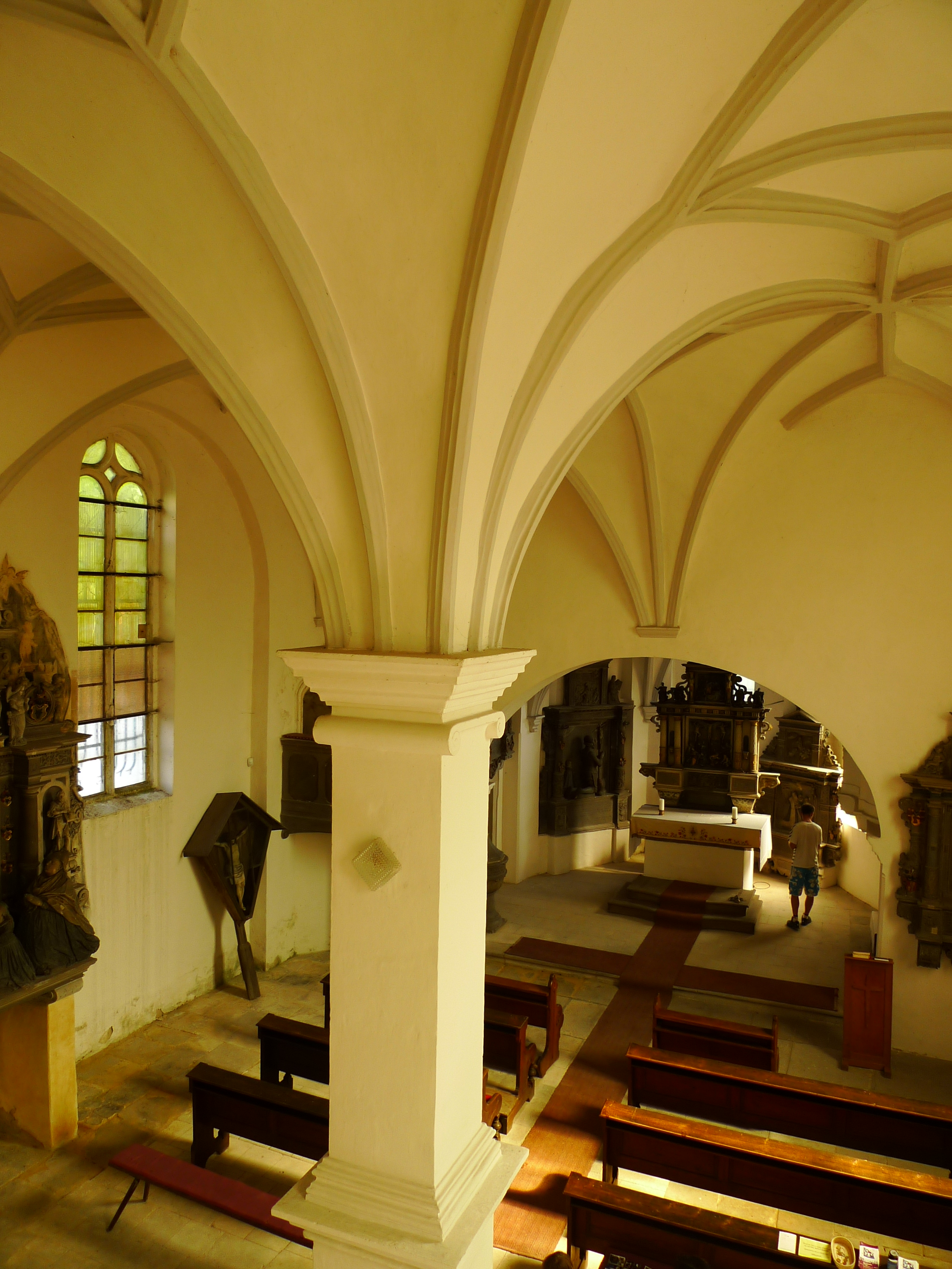 Kostel svatého Václava, Valtířov.